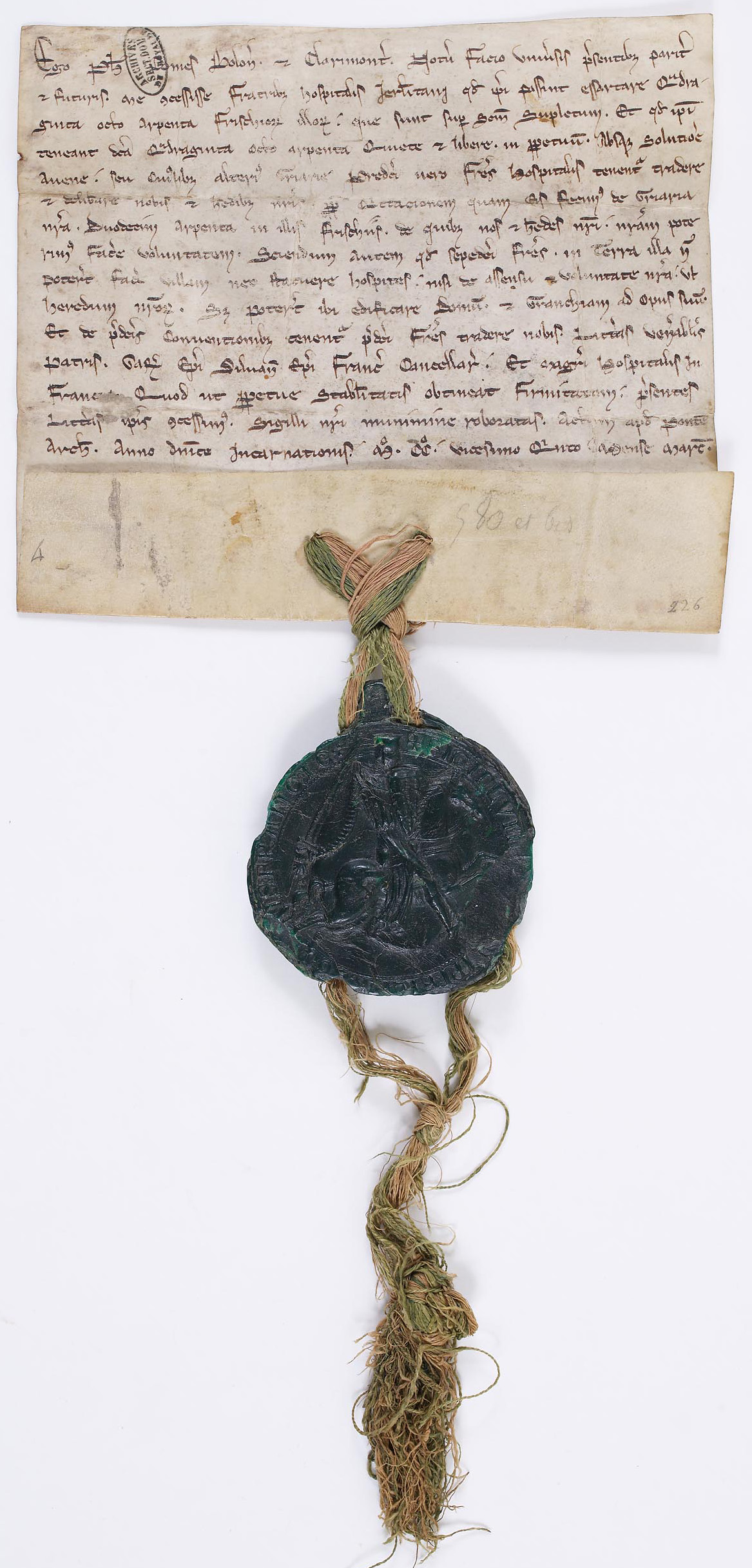 Concession par Philippe Hurepel aux hospitaliers de Saint-Jean de Jérusalem de 48 arpents de terre à défricher prèse de Saint-Souplets, Mars 1226